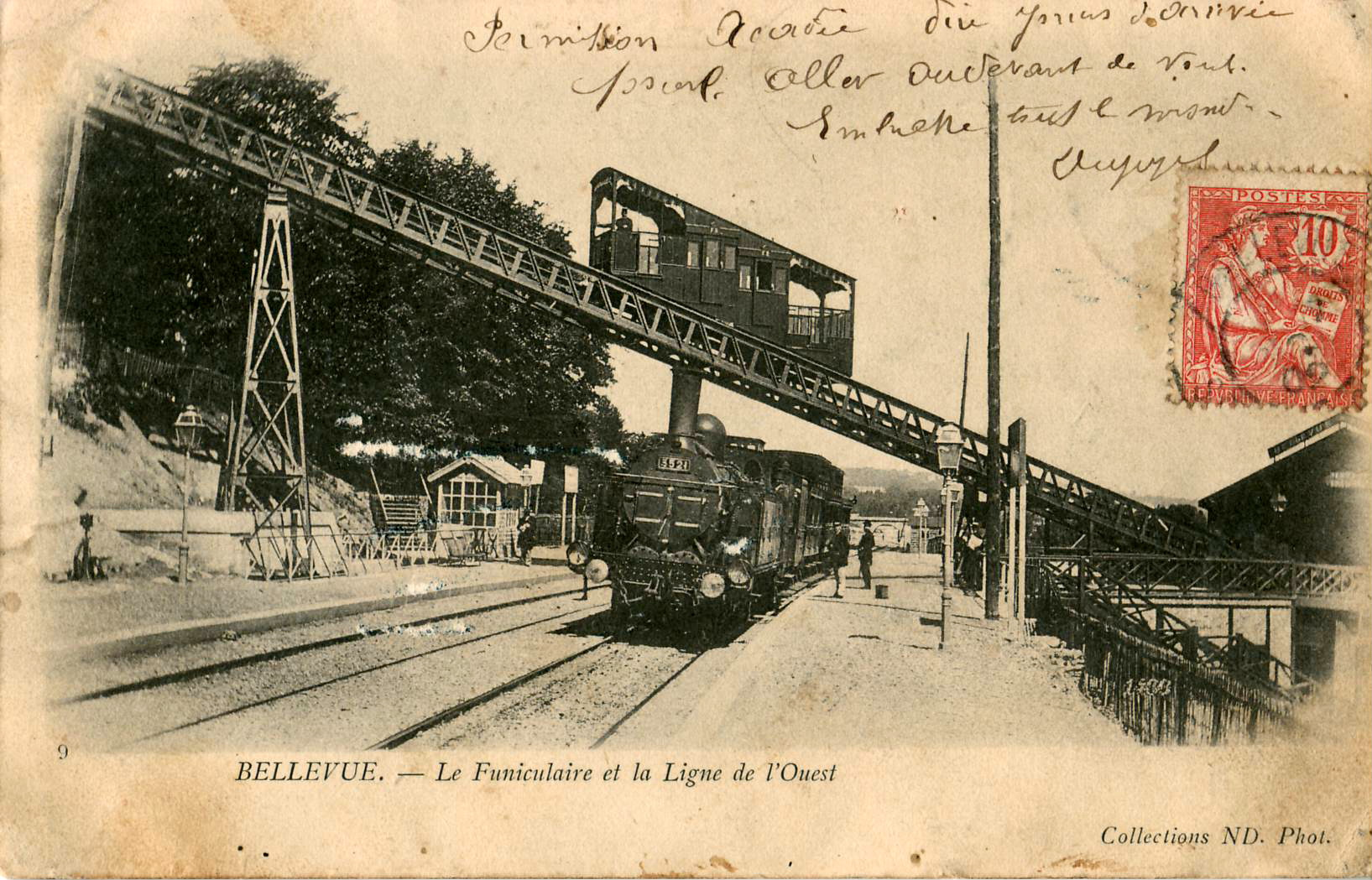 Carte postale ancienne éditée par ND 9 : BELLEVUE - Le Funiculaire et la Ligne de l'Ouest ; locomotive 3521